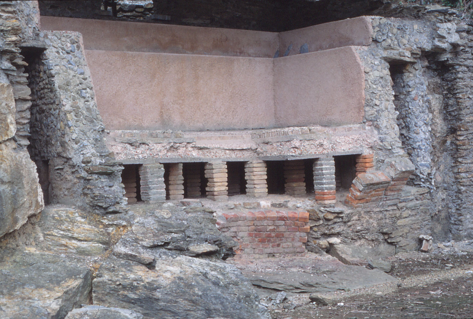 Calidario